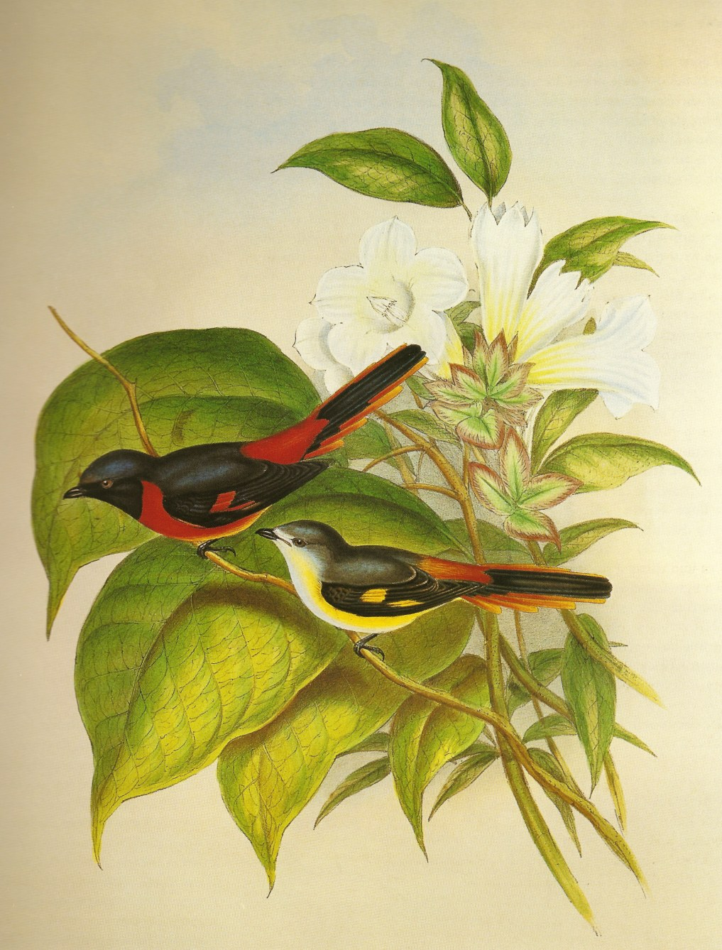 Small Minivet Pericrocotus cinnamomeus peregrinus (Linnaeus)